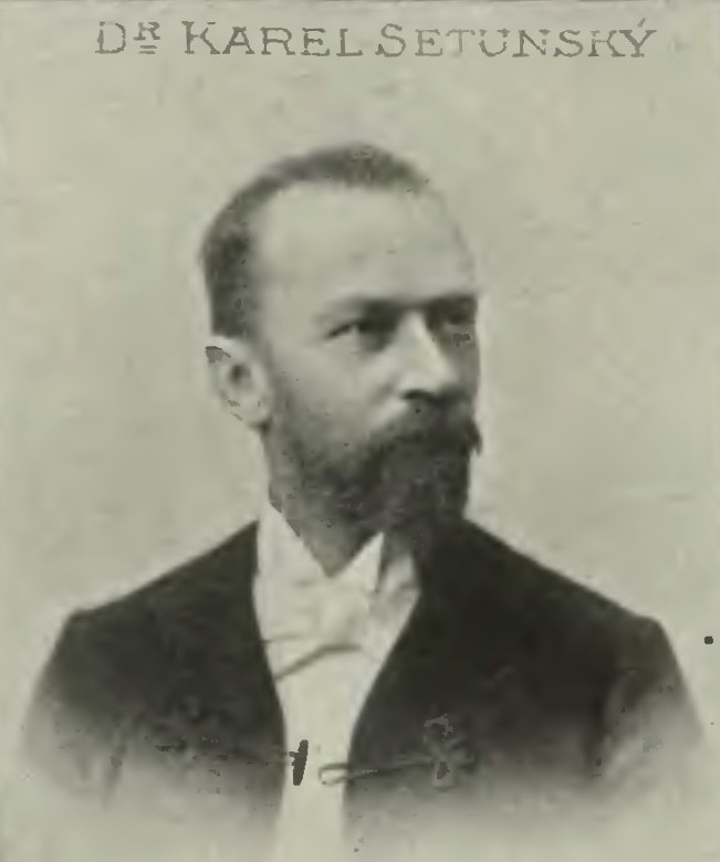 Portrét – Karel Setunský (1850 - 1929), Český právník a politik.